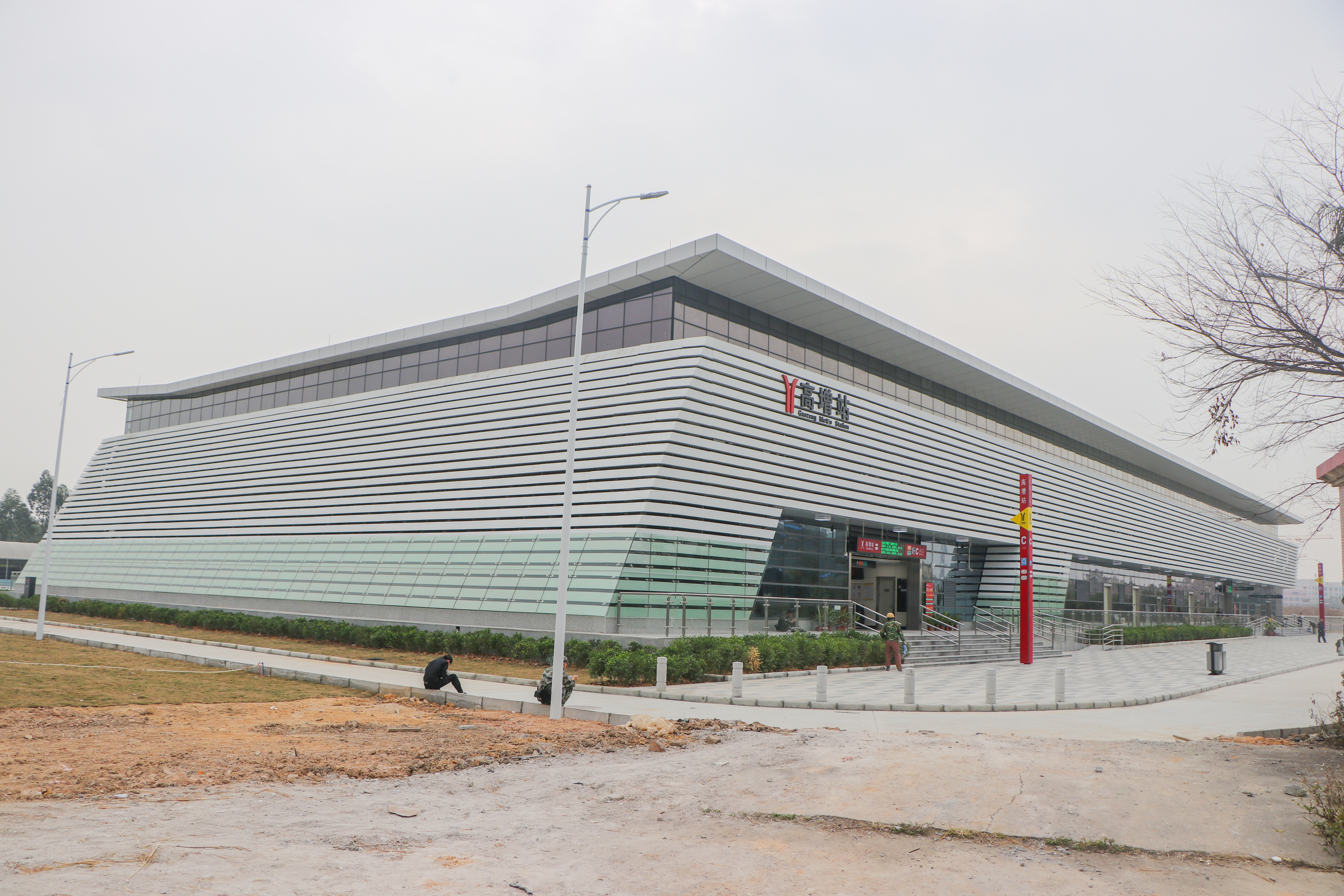 广州地铁高增站